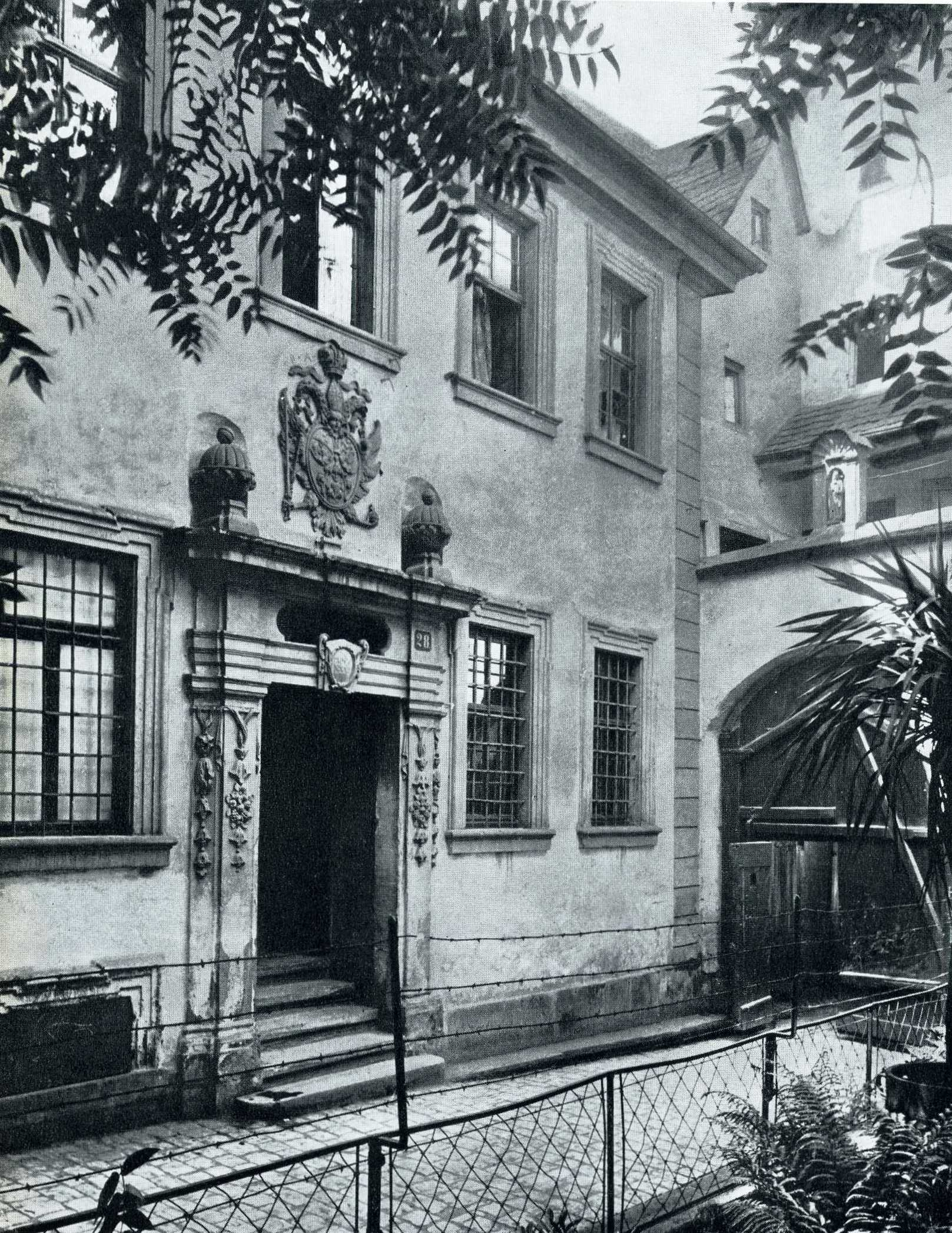 Der Kaisheimer Hof in Heilbronn. Nordfassade mit Portal